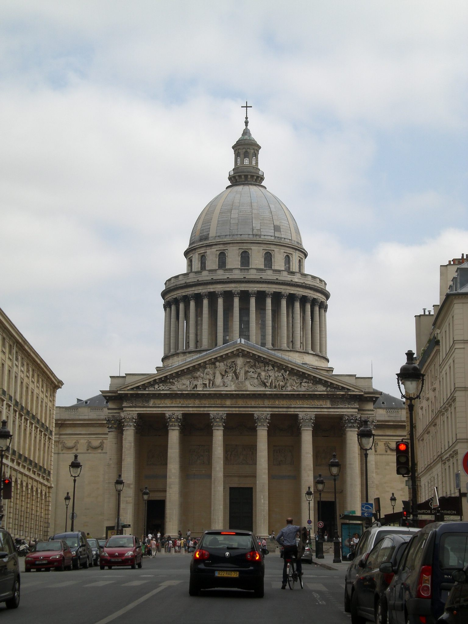 Panteó de París (agost 2009)